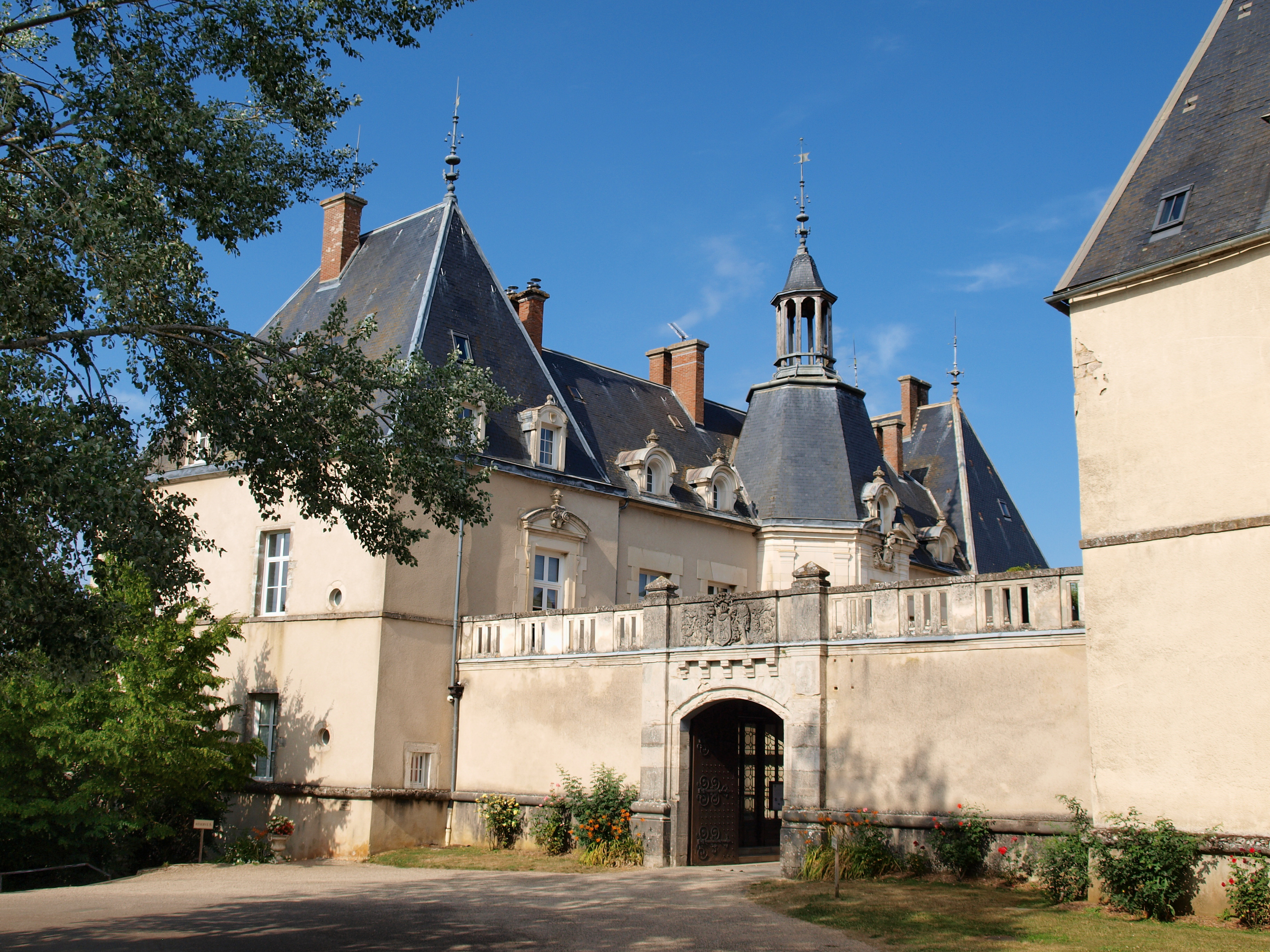 Château de Sainte-Sabine (Côte-d'Or, France)